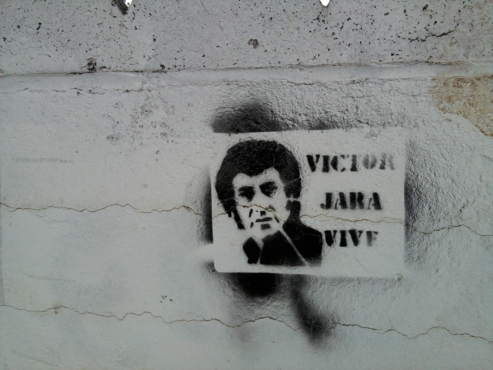 Arte urbano en Chile